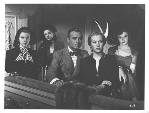 Fotografía blanco y negro sobre papel fotográfico brillante con marco perimetral blanco. Película: Cuando besa mi marido. Escena en un palco de un teatro. Sentados de izquierda a derecha: Marga Landova, Cristina Berys, Ángel Magaña, Malisa Zini e Hilda Rey. Todos miran hacia la derecha.